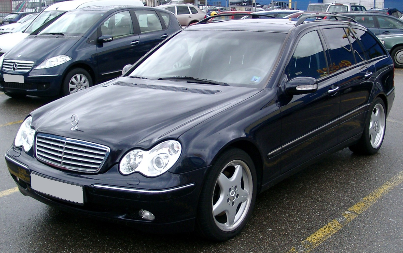 Mercedes-Benz S203 (T-Modell)